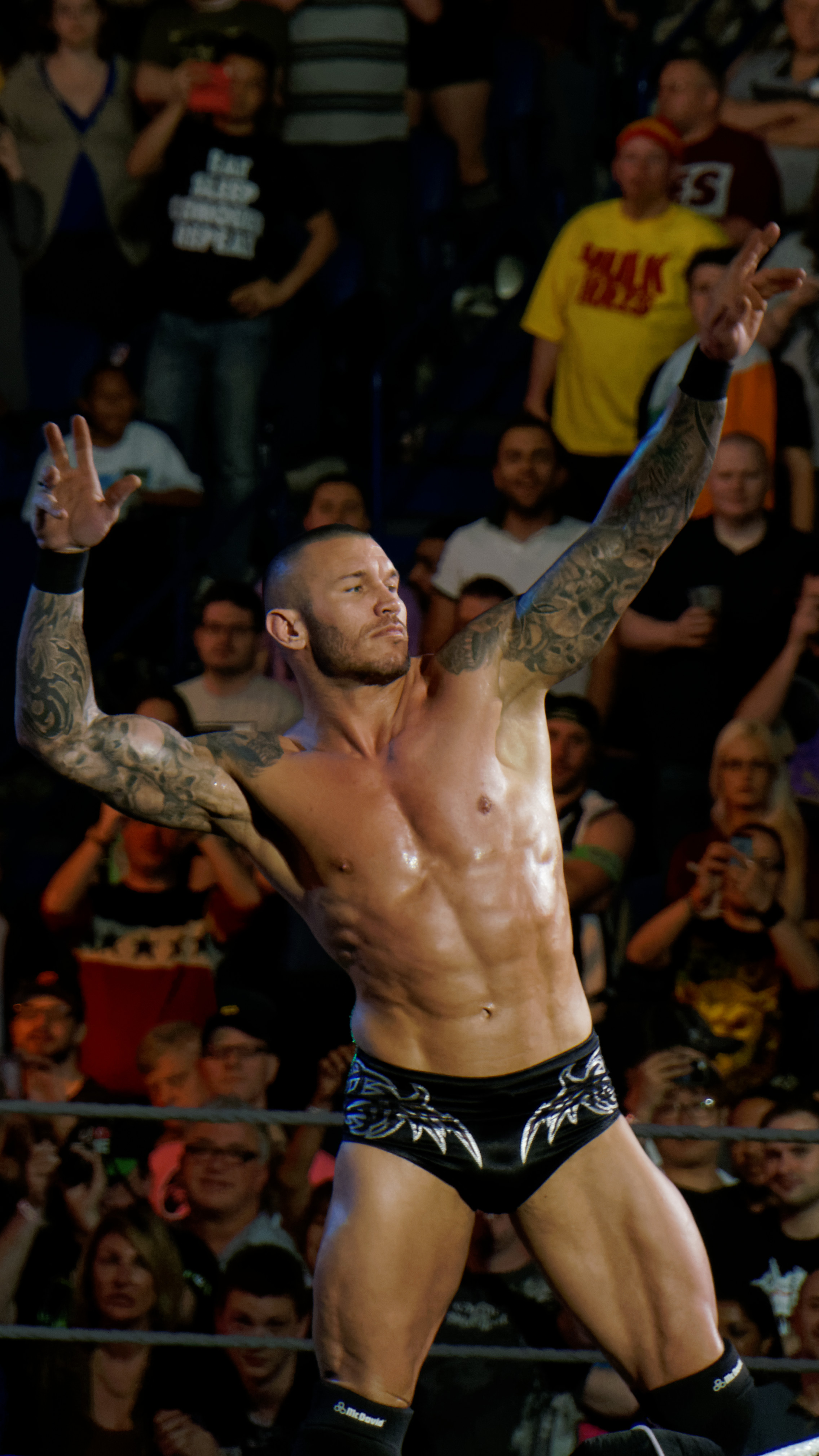 2014-04-07_20-18-42_NEX-6_1223_DxO